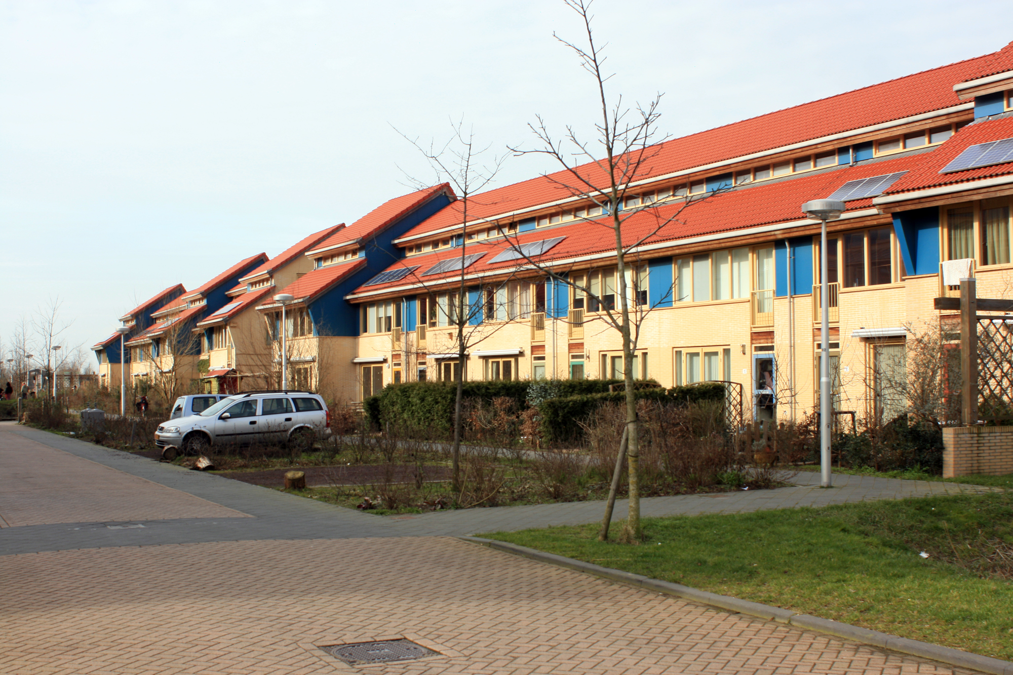 Aureliahof Parkwijk Noord Utrecht